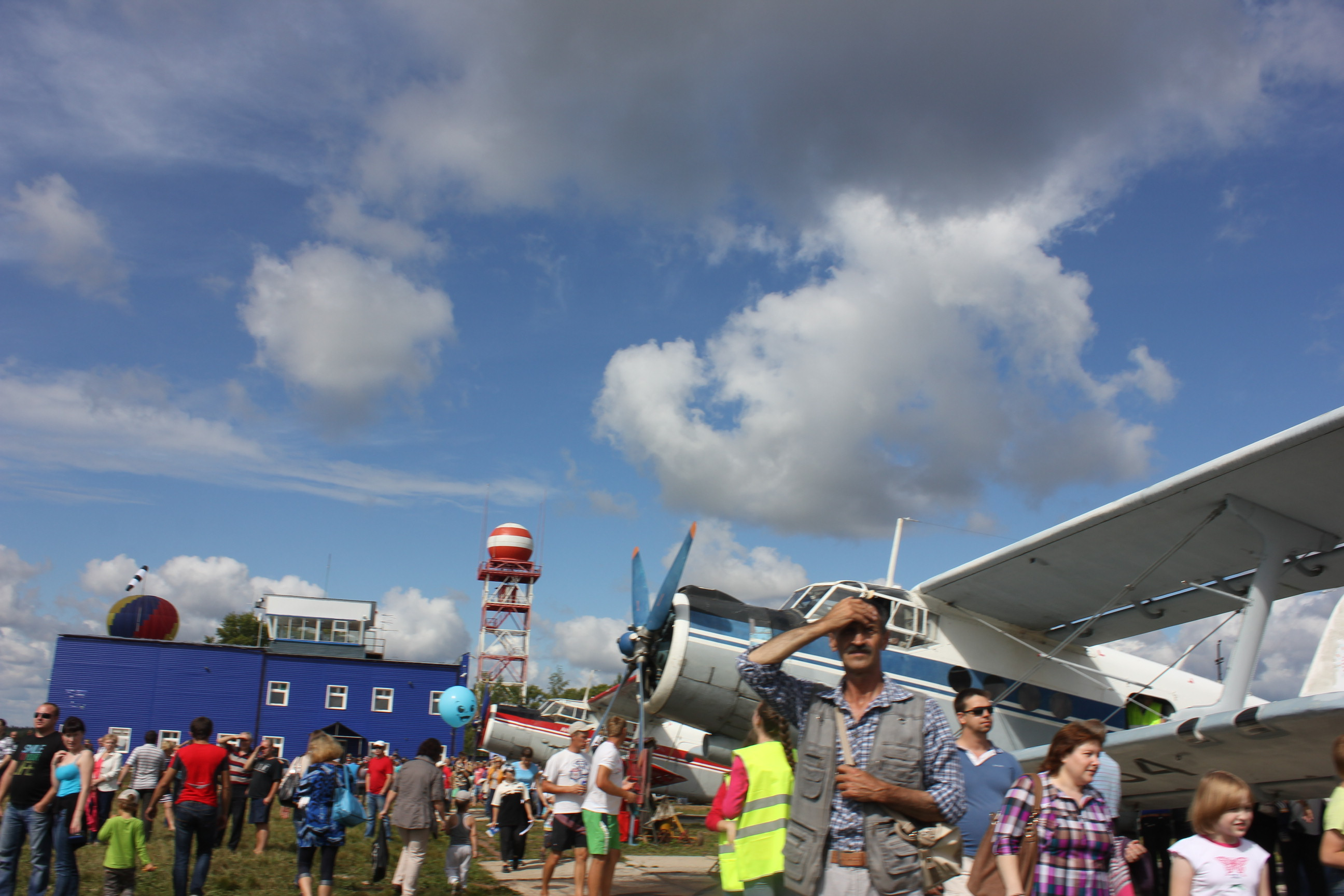 День воздушного флота-2014